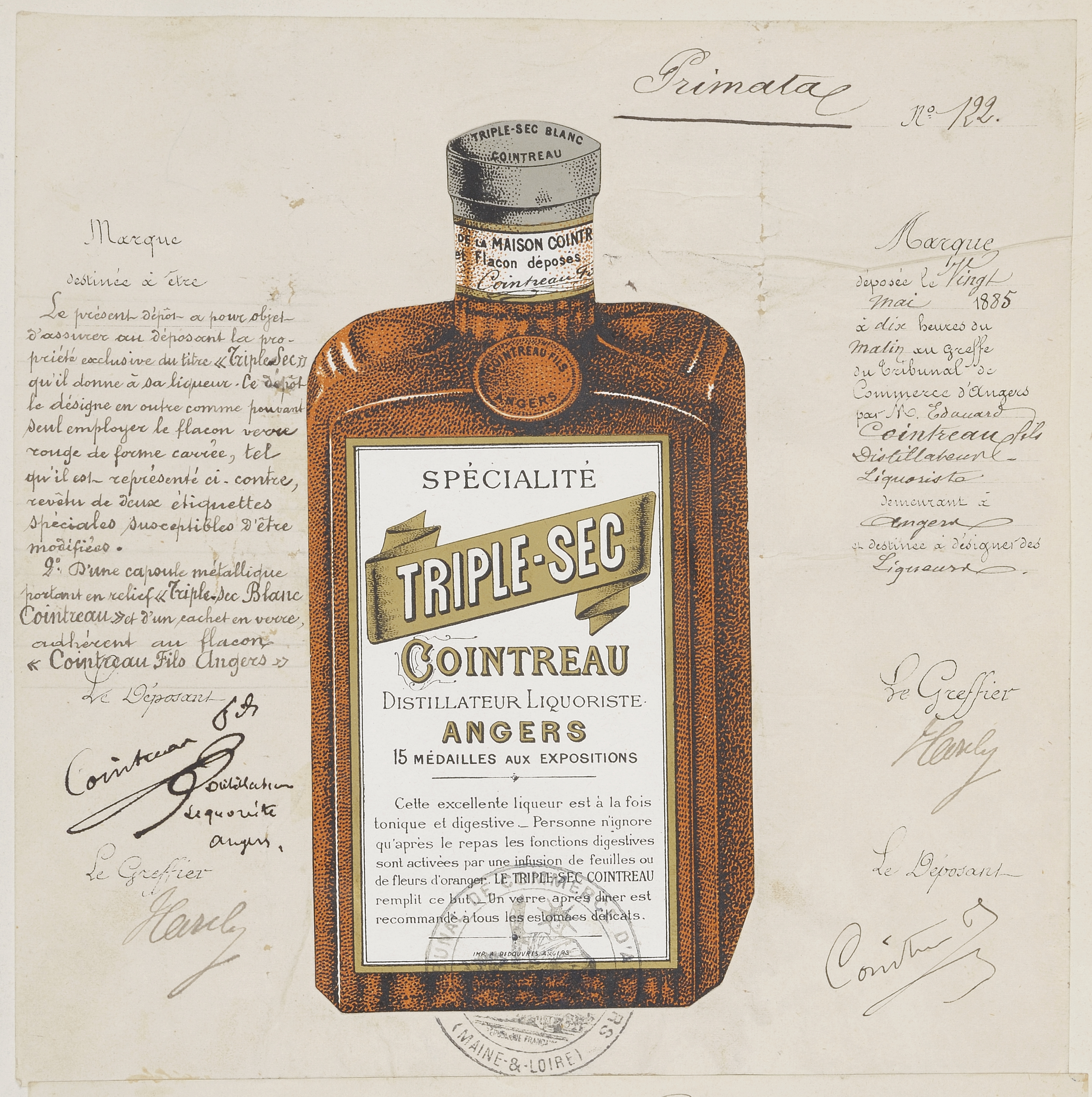 Extrait de dépôt de marque de TRIPLE-SEC 1885. Enregistrement au greffe du tribunal de Commerce d’Angers dans les archives départementales de l’Ouest le 20 mai 1885 à 10h00.